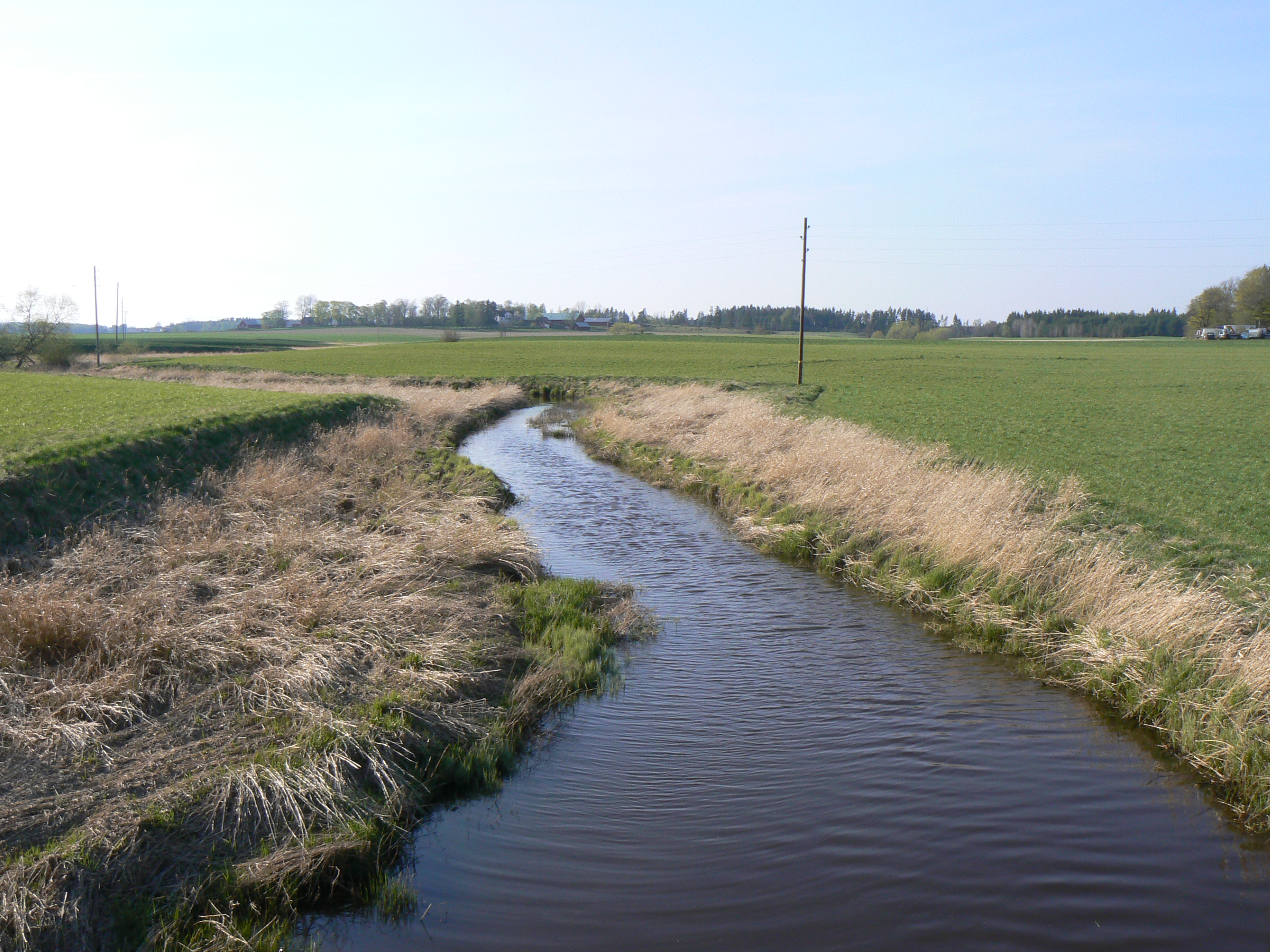 Fettjestadån (Fettjestad river) at Skiestad in Linköping municipality, Sweden.